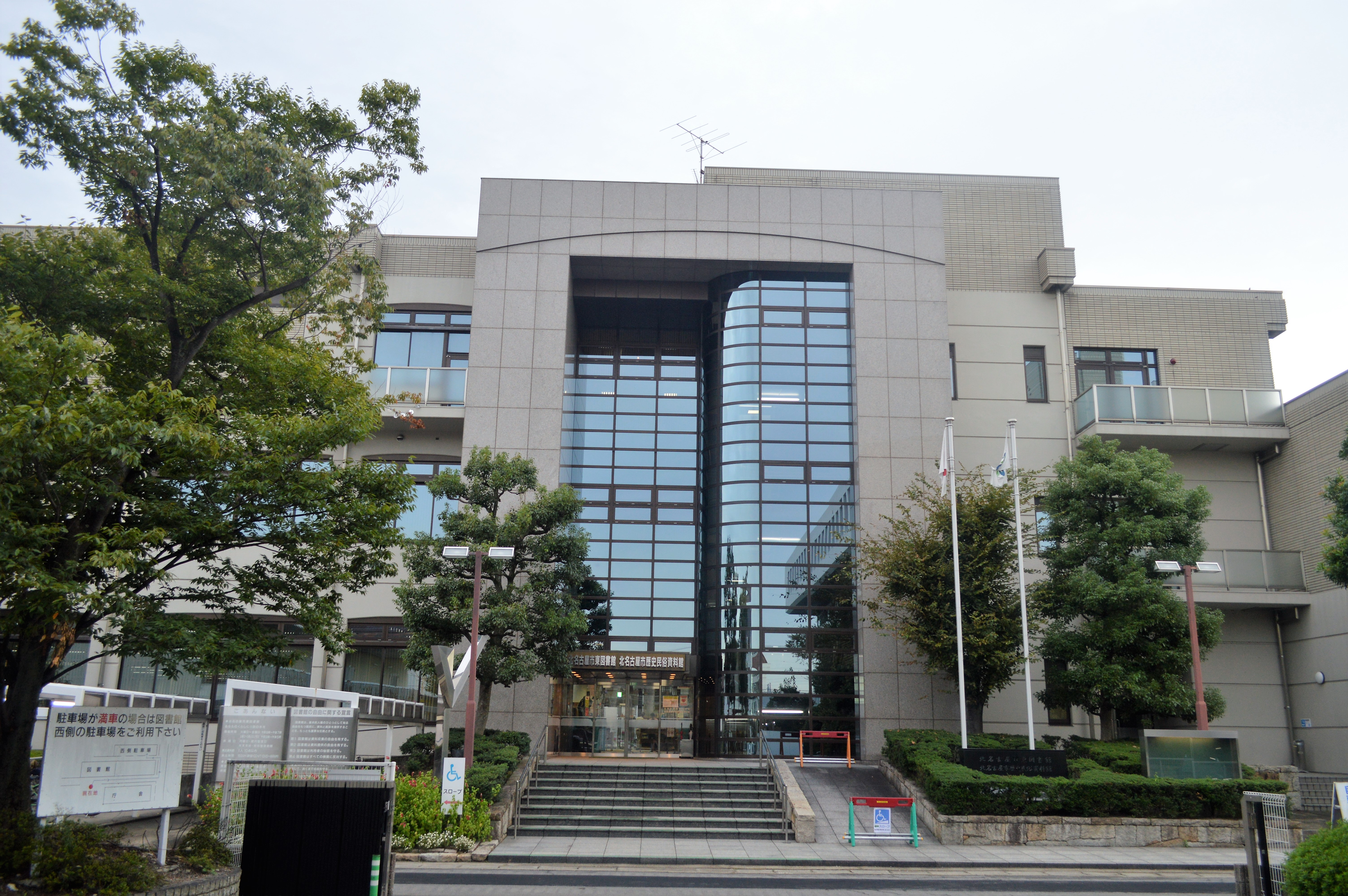 愛知県にある北名古屋市東図書館・北名古屋市歴史民俗資料館。